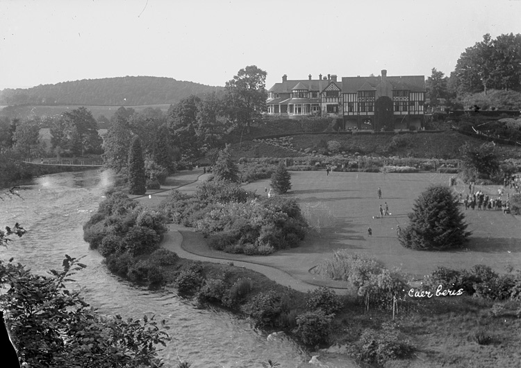 Caer Beris Manor, Builth Wells Ffotograffydd/Photographer: P B Abery (1877?-1948) Dyddiad/Date: [192-?] Cyfrwng/Medium: Negydd gwydr / Glass negative Maint/Dimensions: 119 x 163 mm. Cyfeiriad/Reference: PBA38/2 (pba00646) Rhif cofnod / Record no.: 4517938 Rhagor o wybodaeth am gasgliad P B Abery yn Llyfrgell Genedlaethol Cymru More information about the P B Abery Collection at the National Library of Wales